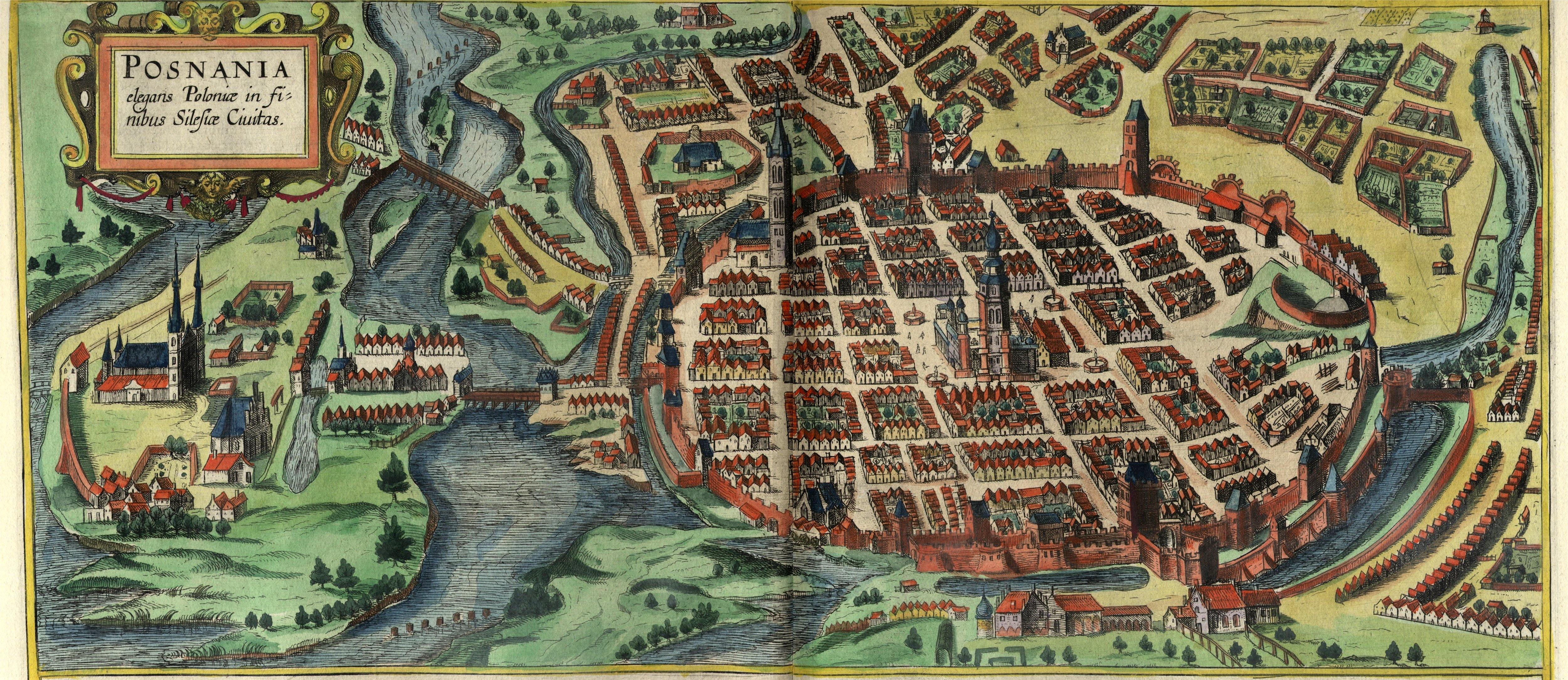 Posnania (Poznań), ca. 1617, view from north